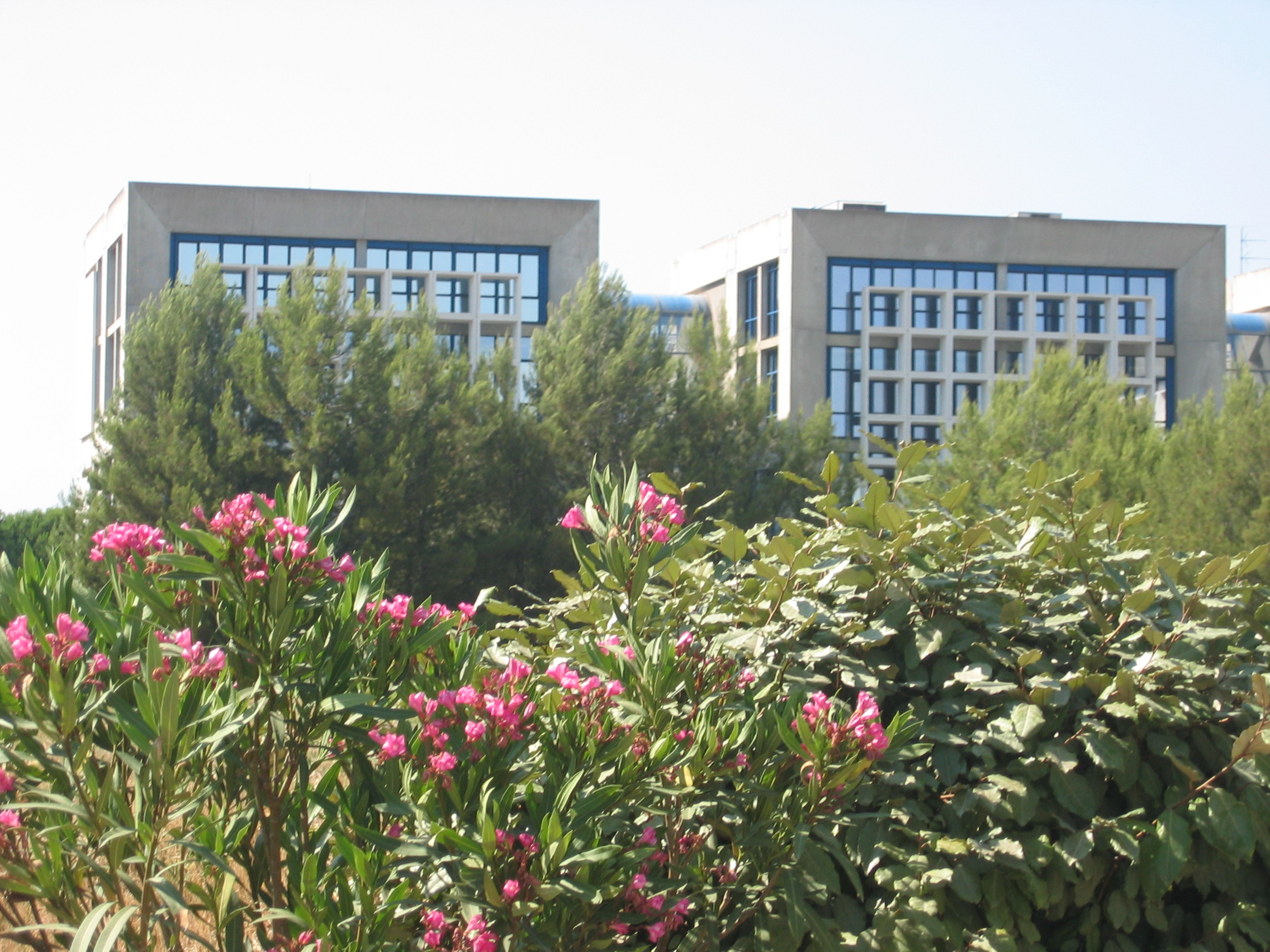 Le Parc scientifique et technique Georges Besse, photo de Nicolas Cadène. Propre travail, libre de droits (domaine public).